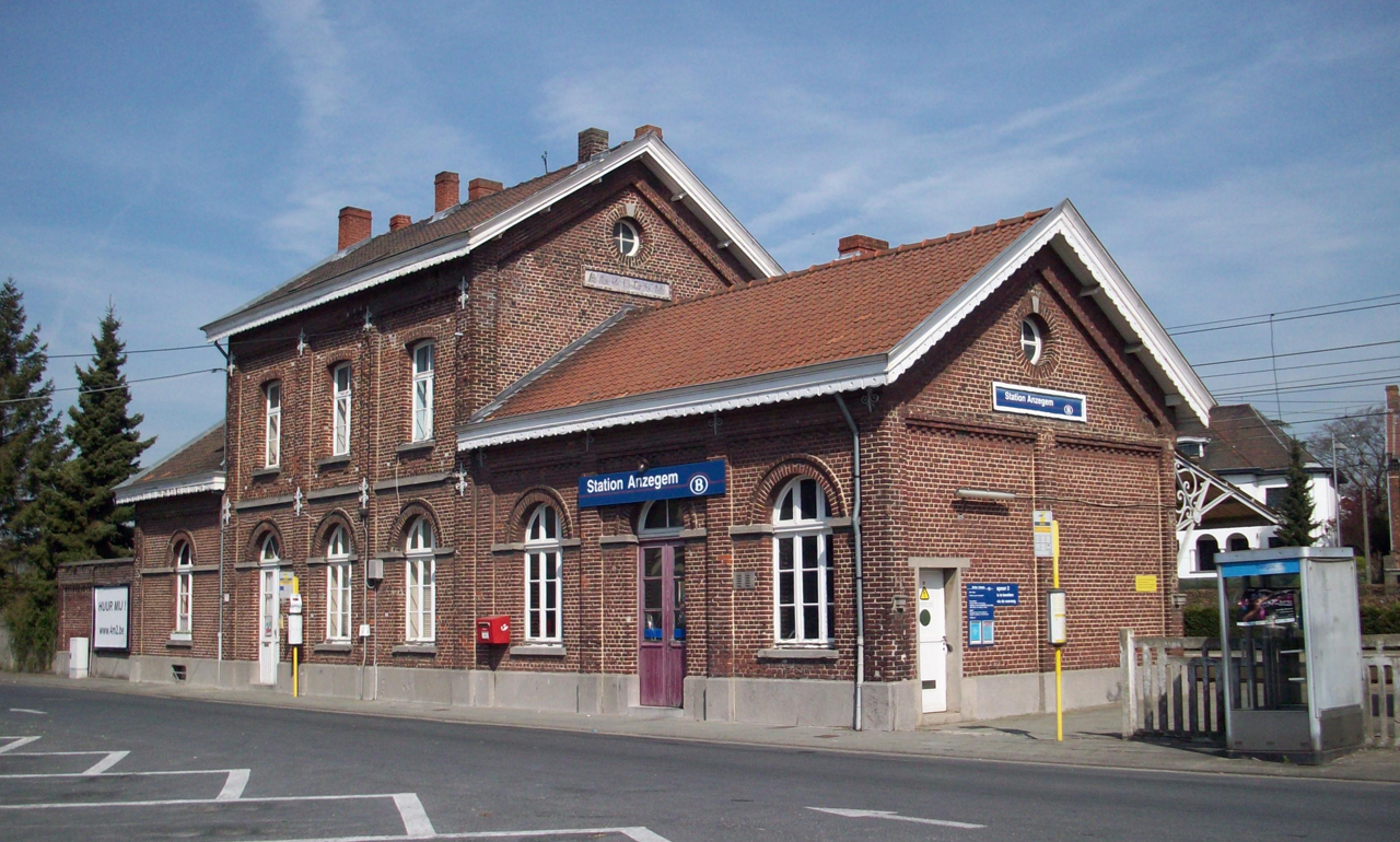 Station Anzegem